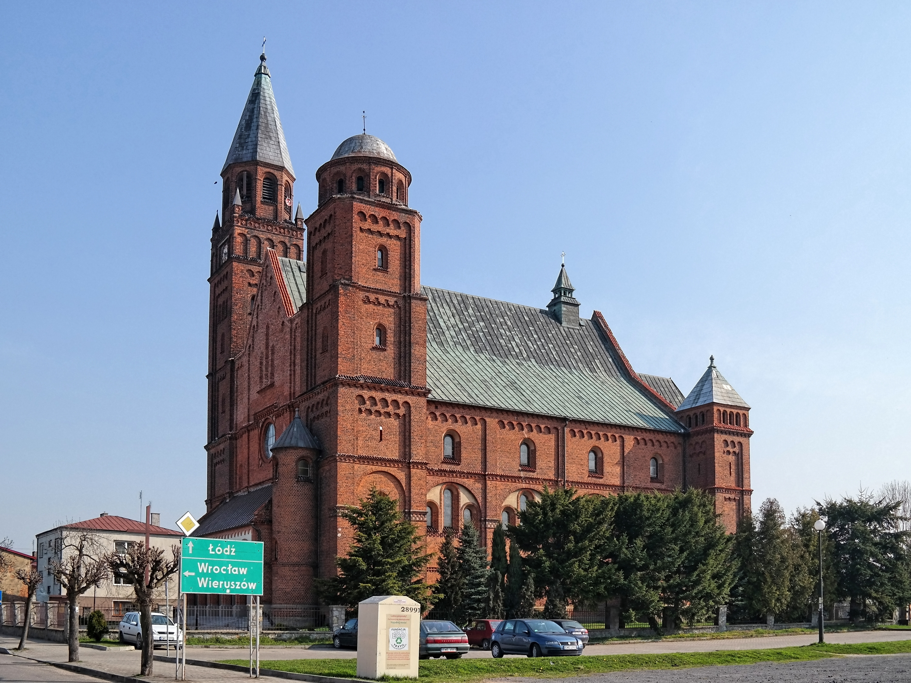 Kościół pw św. Piotra i Pawła w Lututowie.